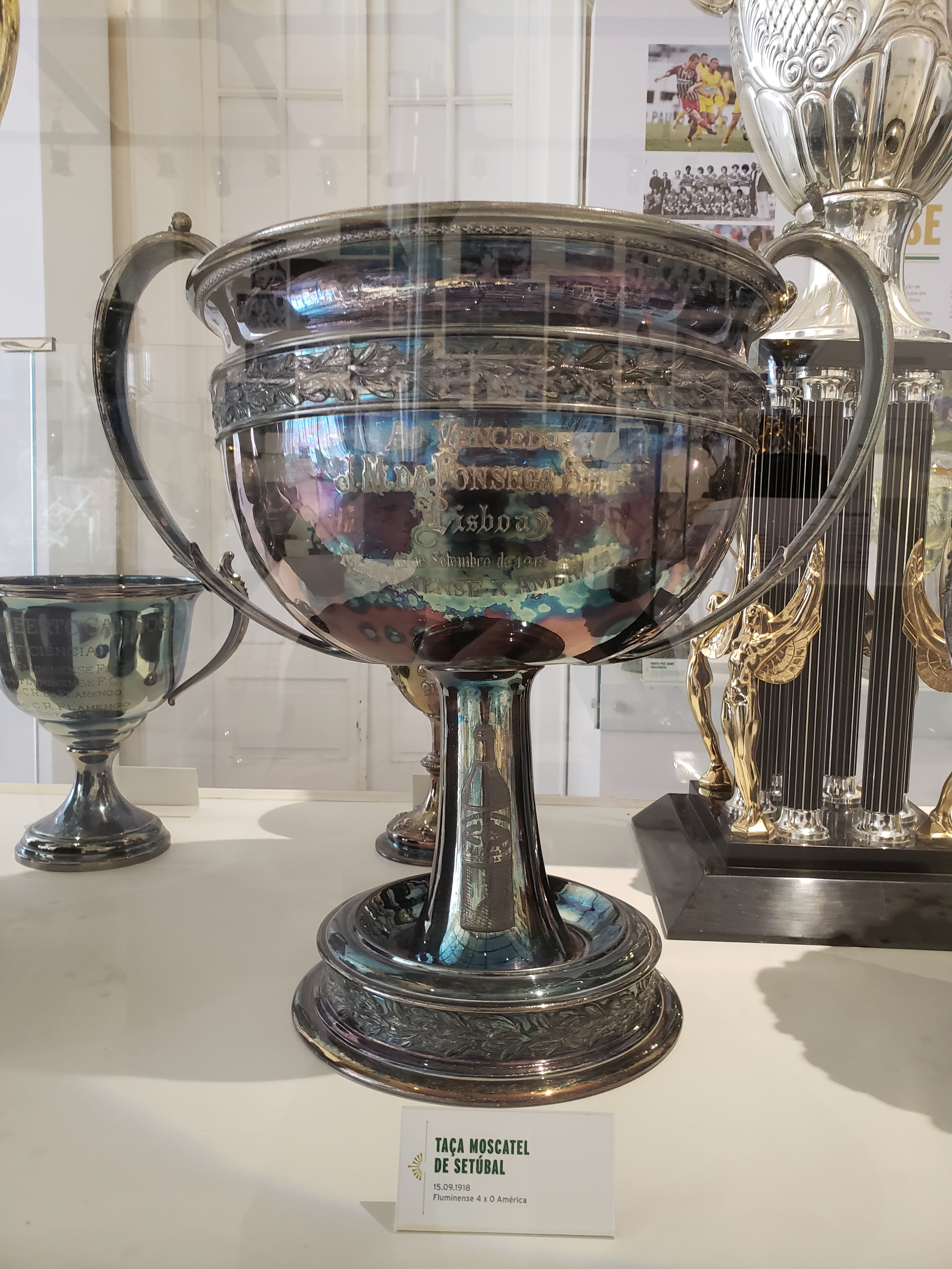 Taça Moscatel de Setúbal 1918 disputada entre Fluminense e America e vencida pelo Fluminense.